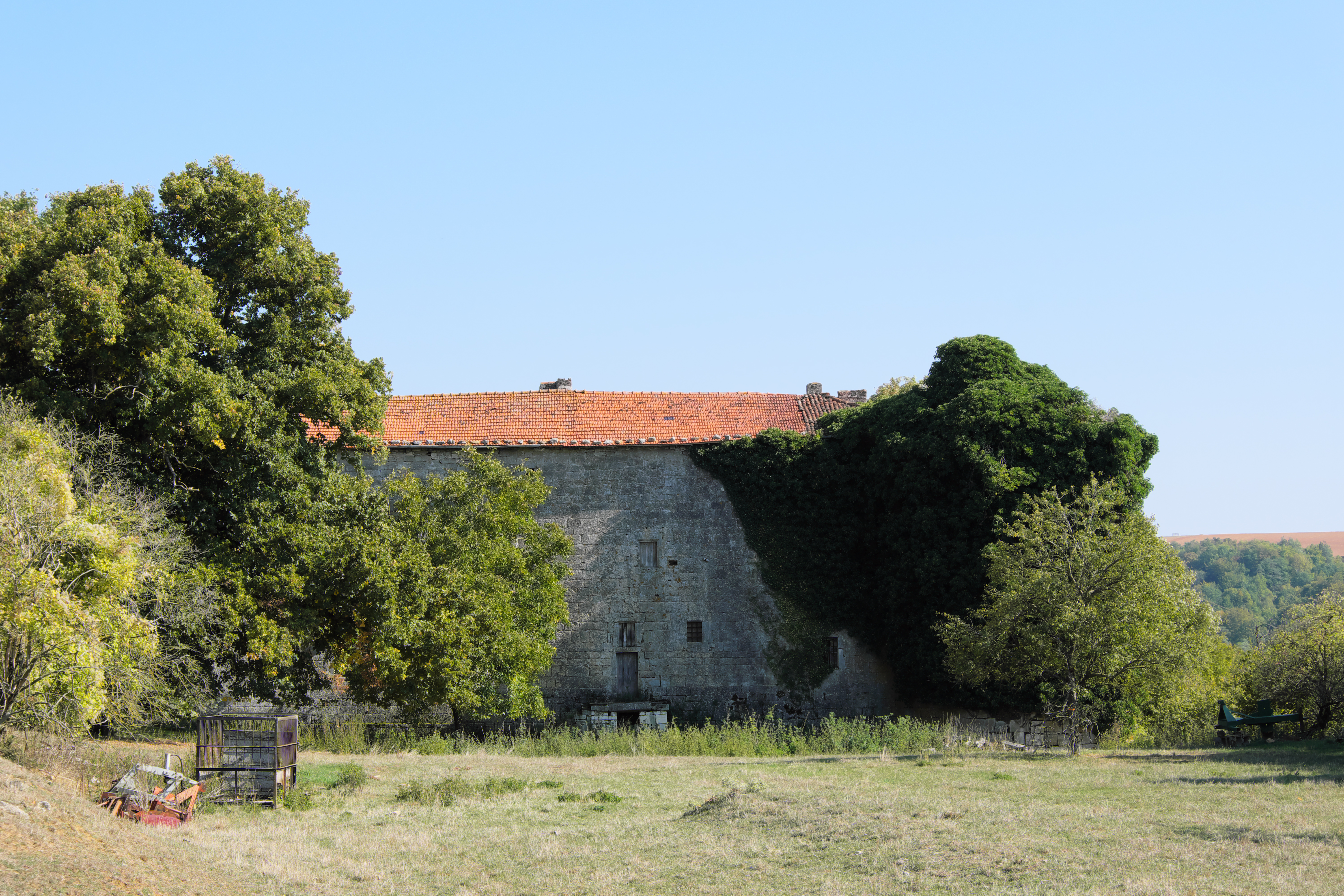 Château de Pierrefort|château de Pierrefort sur le territoire de la commune de Martincourt en Meurthe-et-Moselle (façade sud ouest et tour sud). .